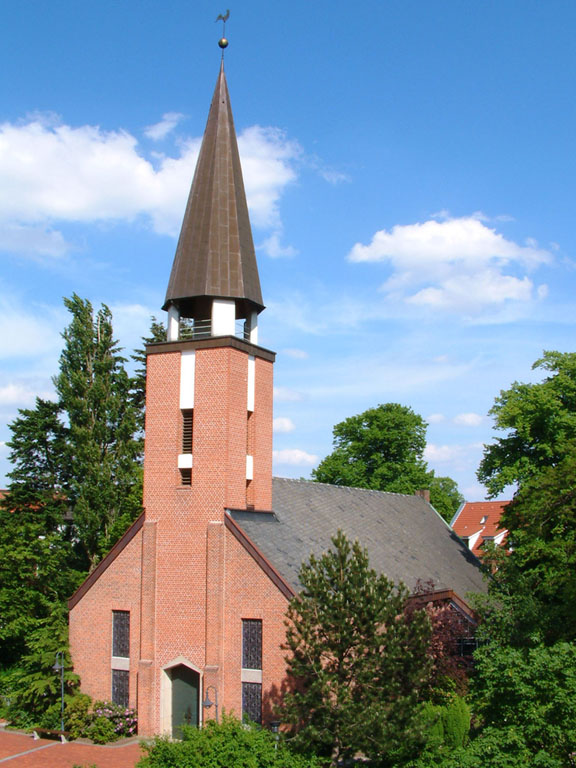 Ev.-luth. Gustav-Adolf-Kirche in Meppen, in dieser Form erbaut 1967